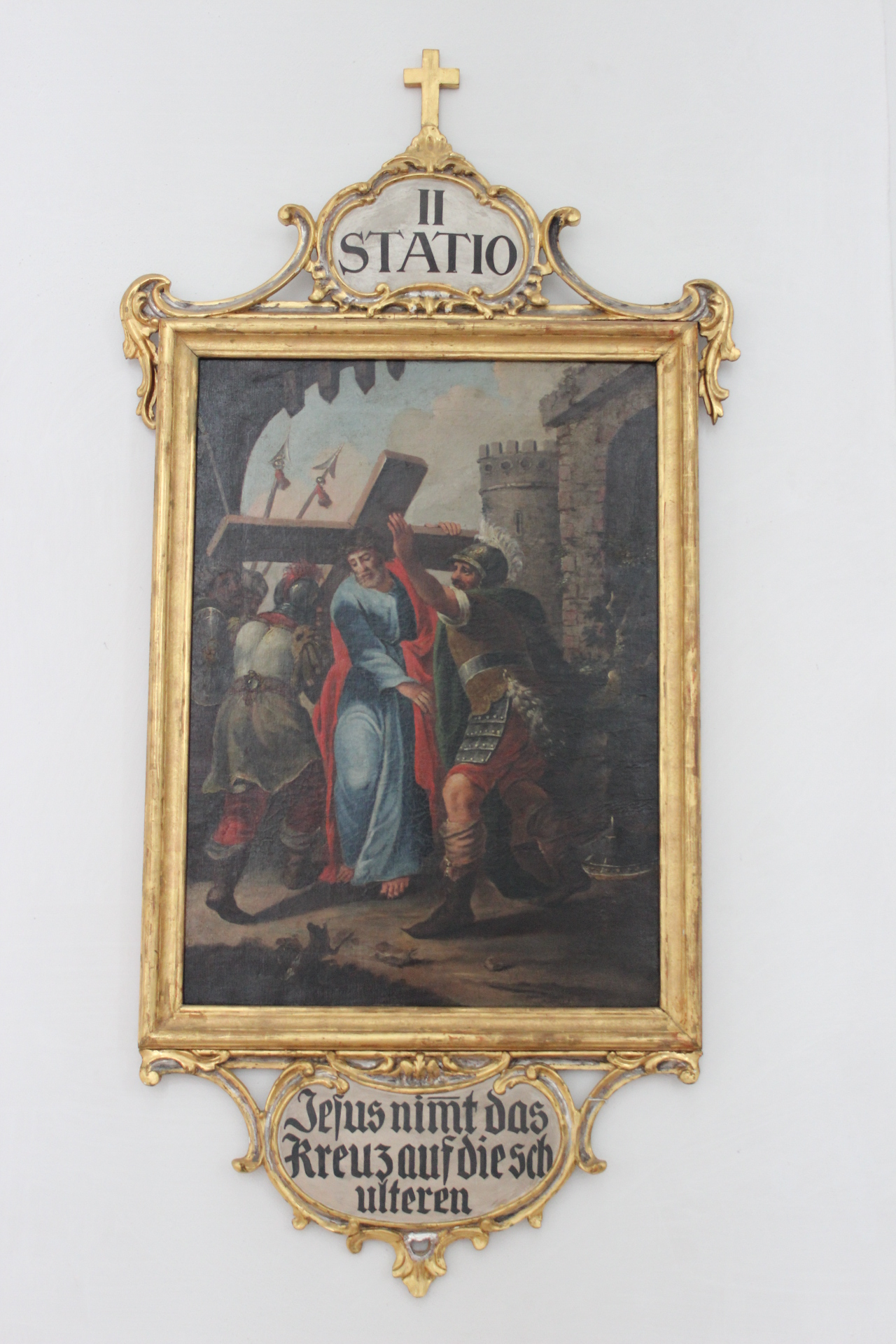 2. Station des Kreuzwegs der Heidelberger Jesuitenkirche